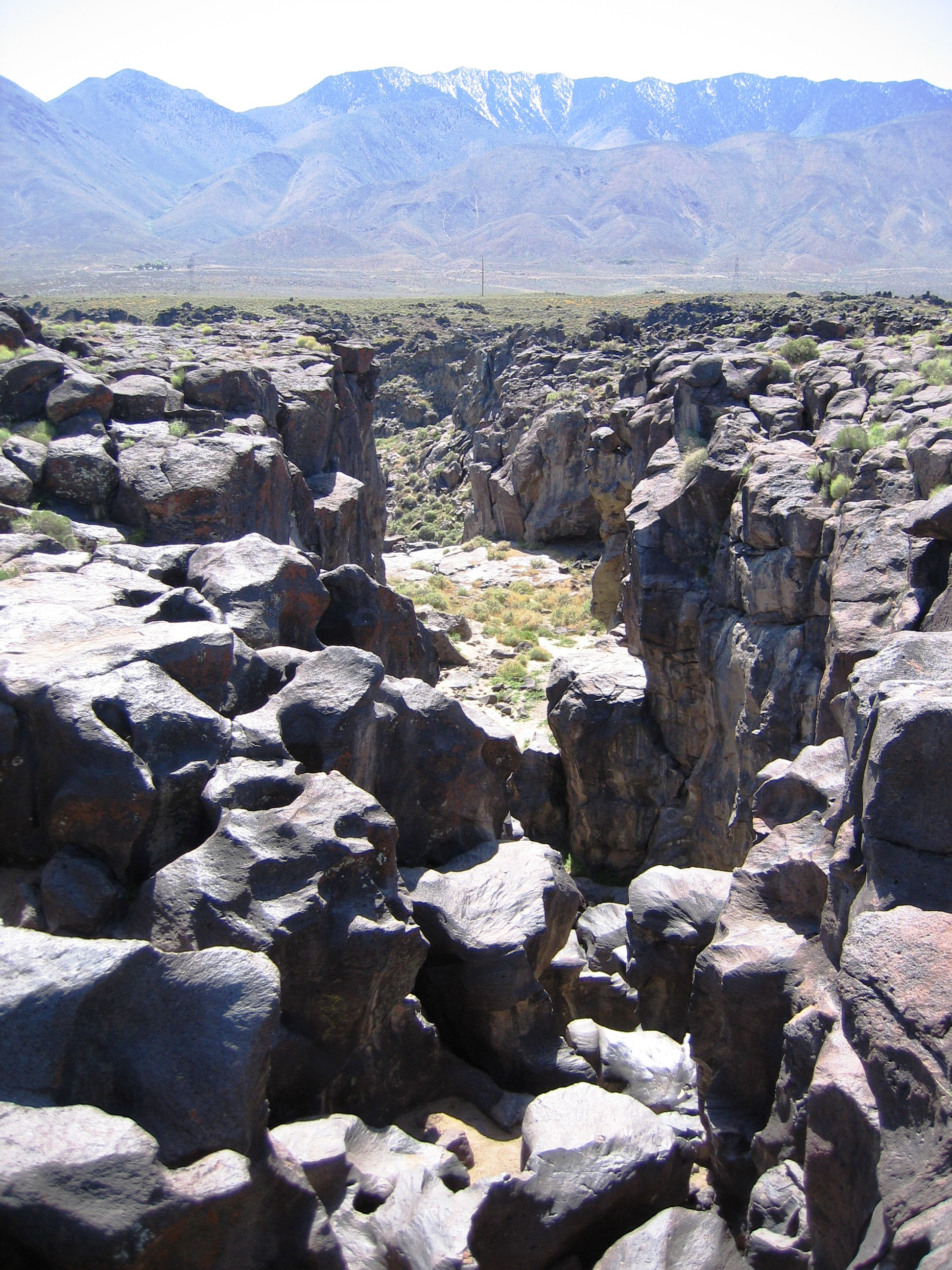 Fossil Falls.